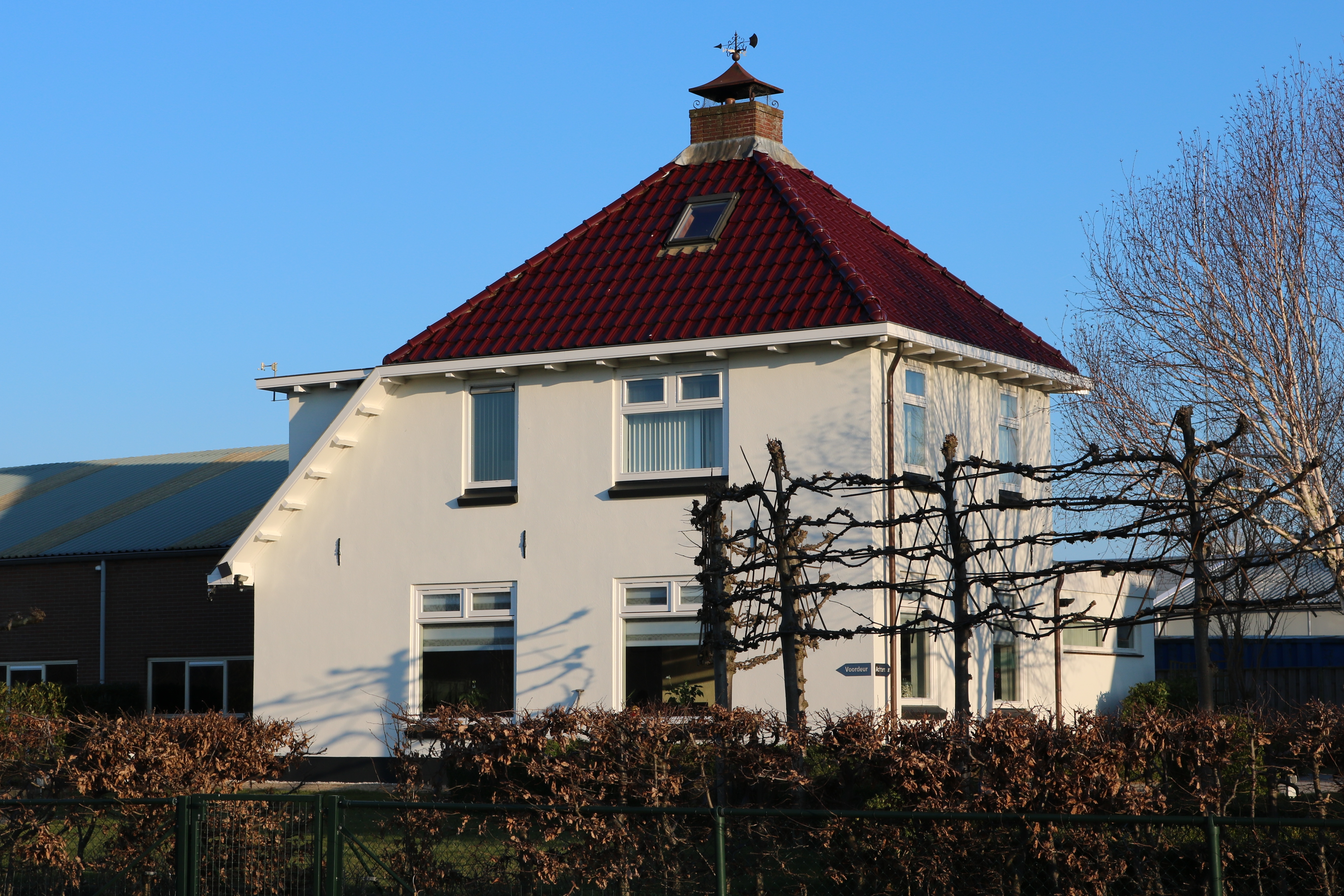 Wachterswoning 17 bij de voormalige stopplaats Venneperweg in Nieuw Vennep, in de spoorlijn van Nieuw Vennep naar Hoofddorp (foto: Daniel van der Ree)